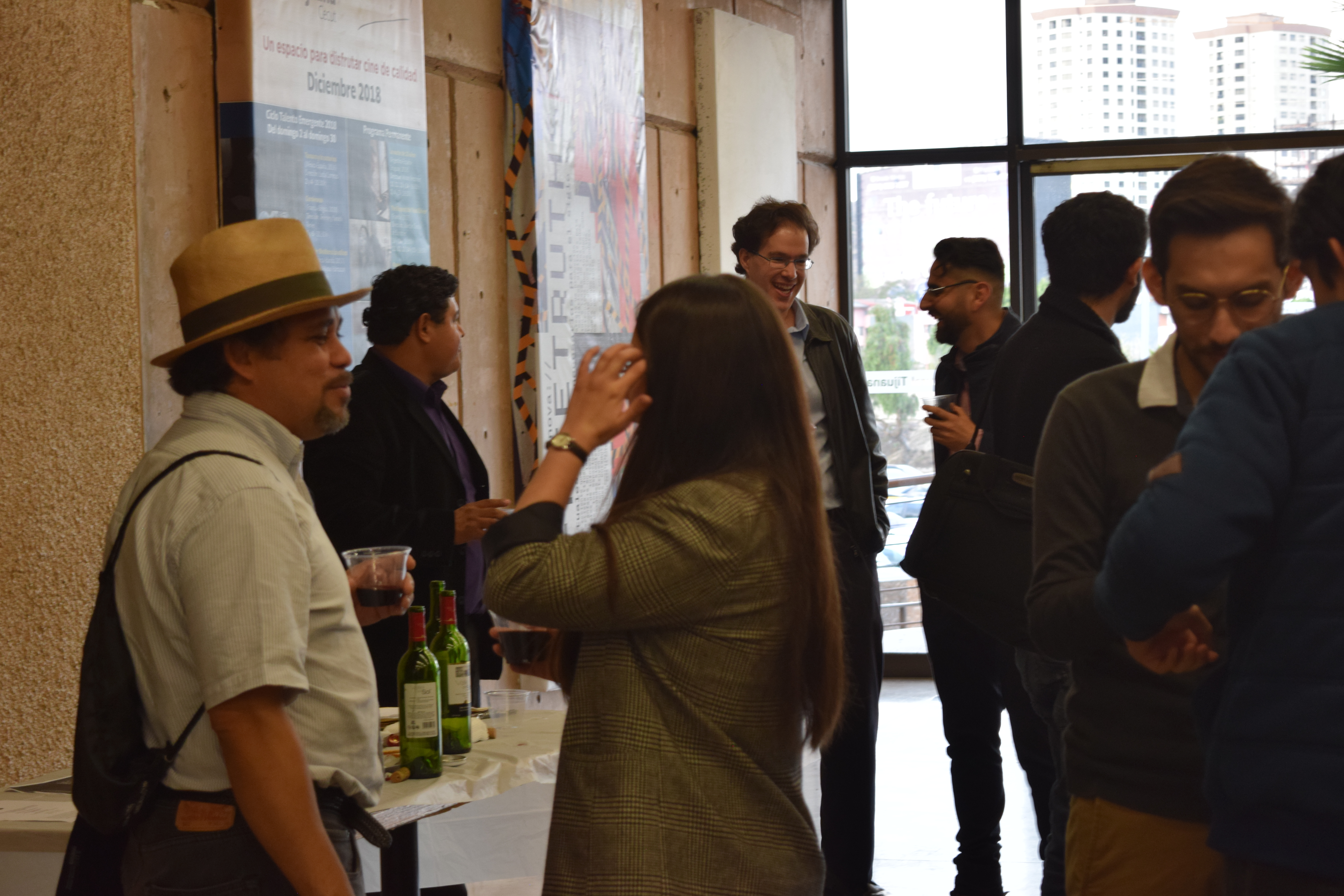 Sexto aniversario del grupo literario "El Comité". CECUT, Tijuana, México.